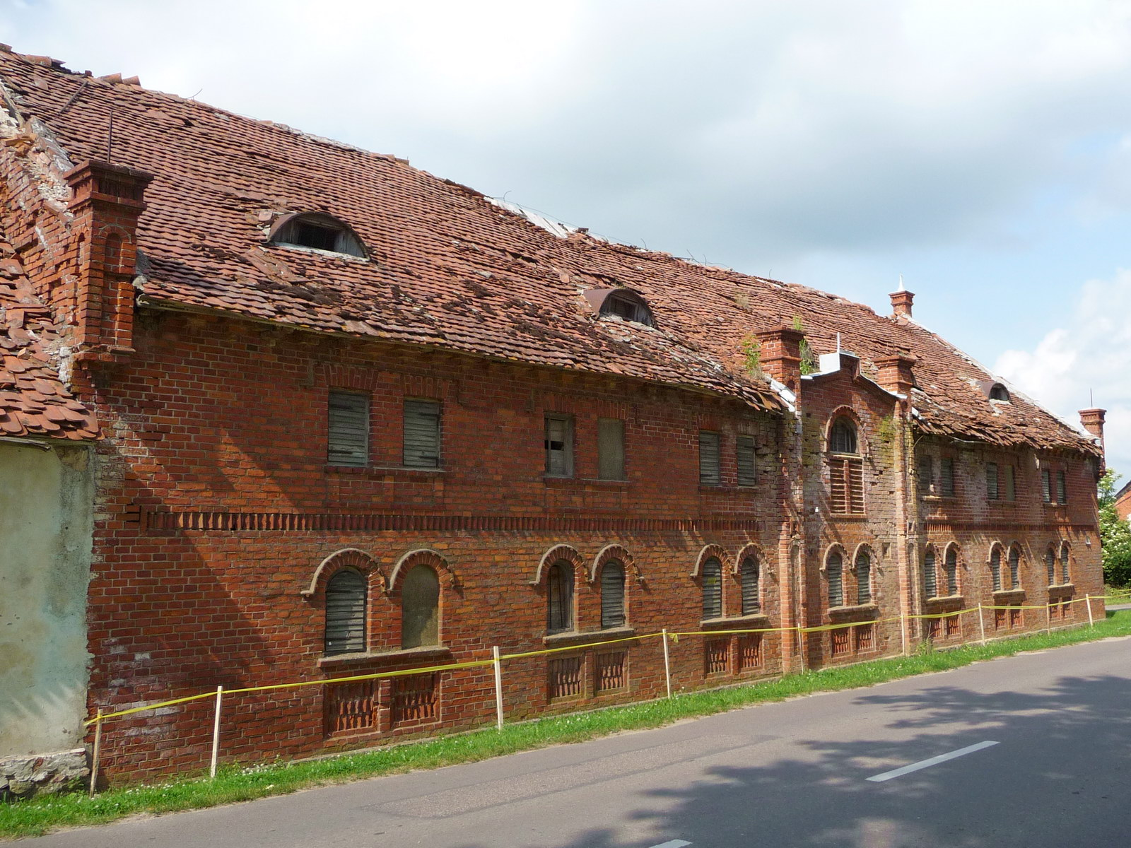 Kidulių dvaro grūdų sandėlis ("špykerė")